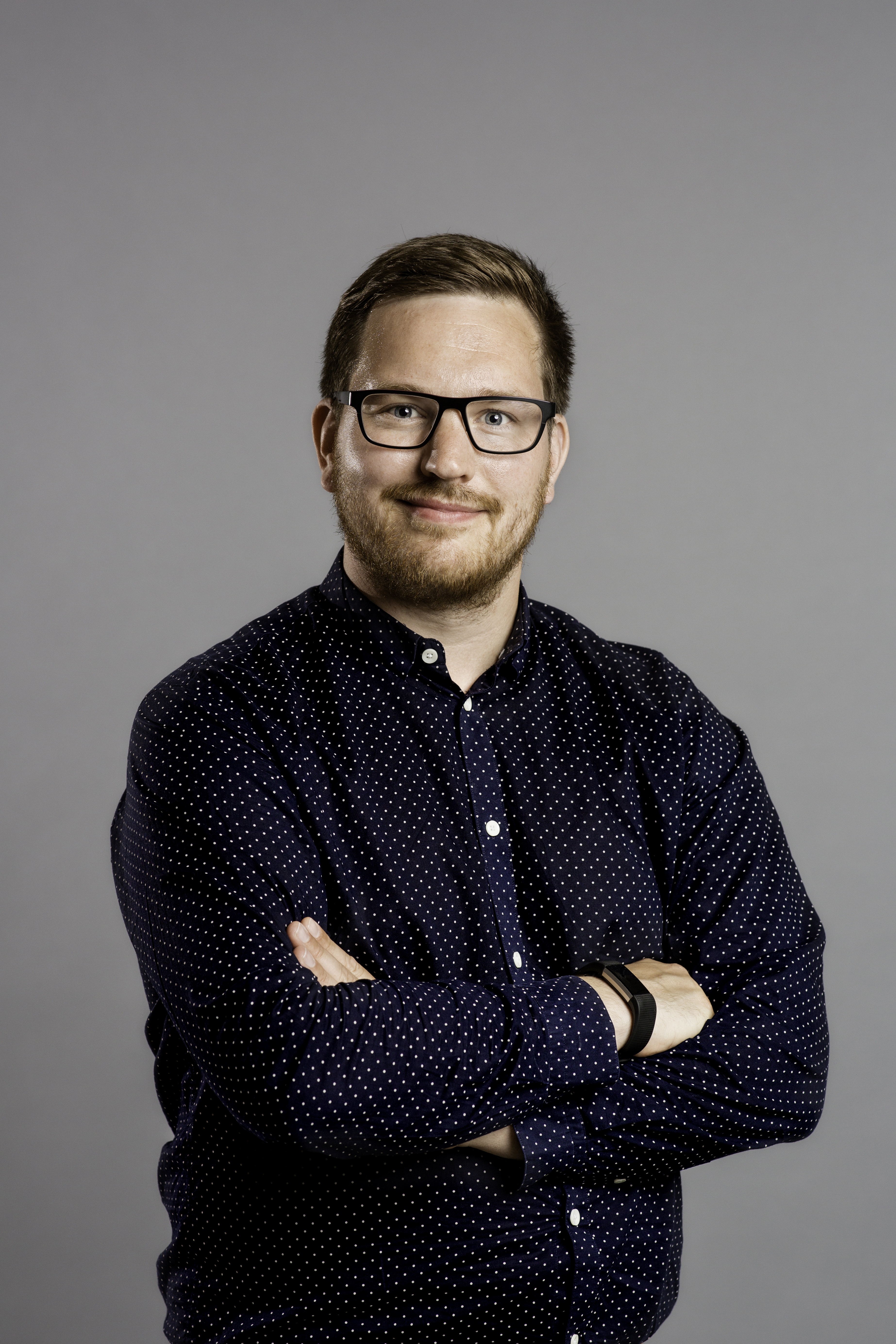 Håkan Svenneling. Vänsterpartiet. 2018.